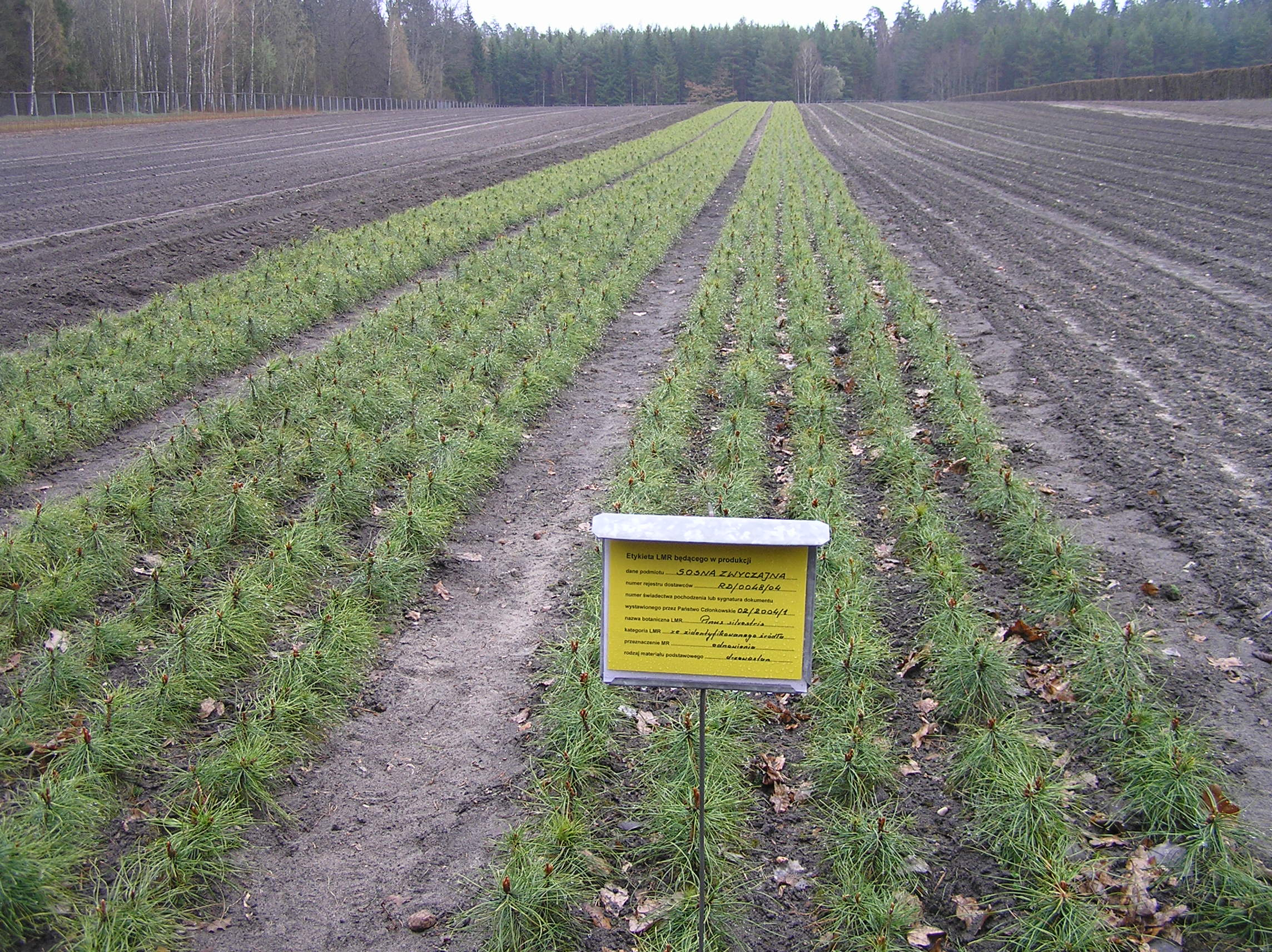 Etykieta LMR (leśny materiał rozmnożeniowy) w produkcji (na szkółce leśnej), Polska